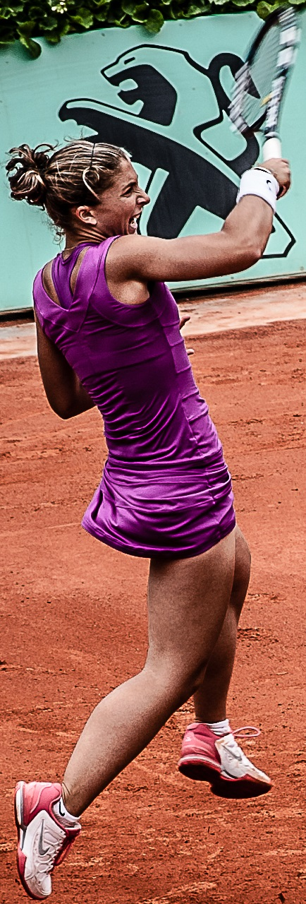 Emiliàn e rumagnòl: La Sara Errani impgnàda in dal Roland Garros dal 2012